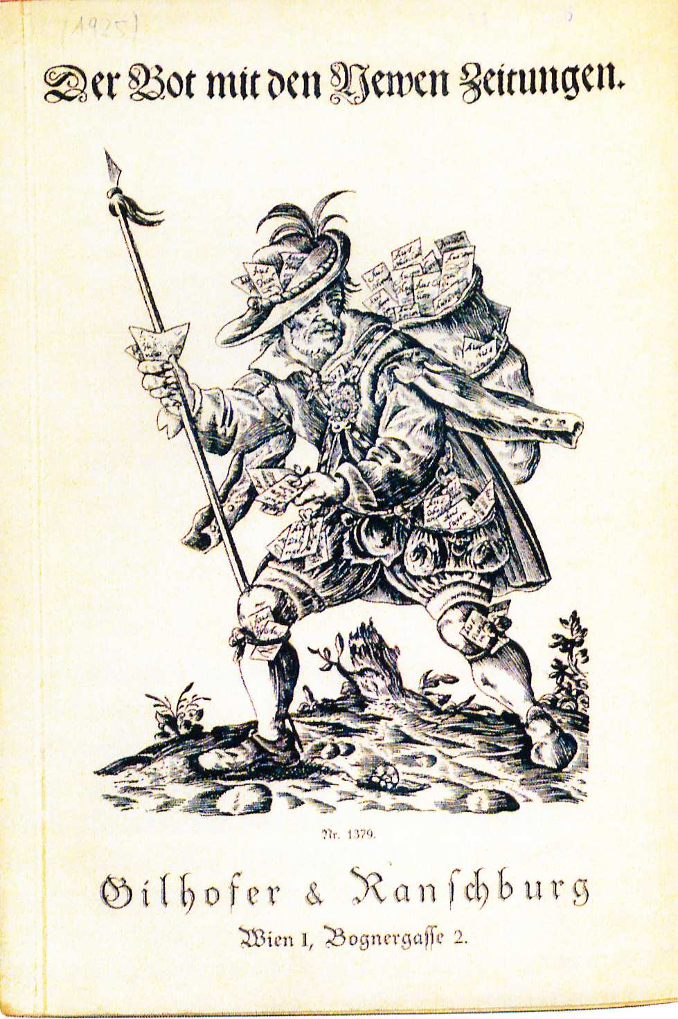 Gilhofer und Ranschburg Antiquariatskatalog 1925. David Manasser: Der Bot mit newen Zeitungen (um 1630)